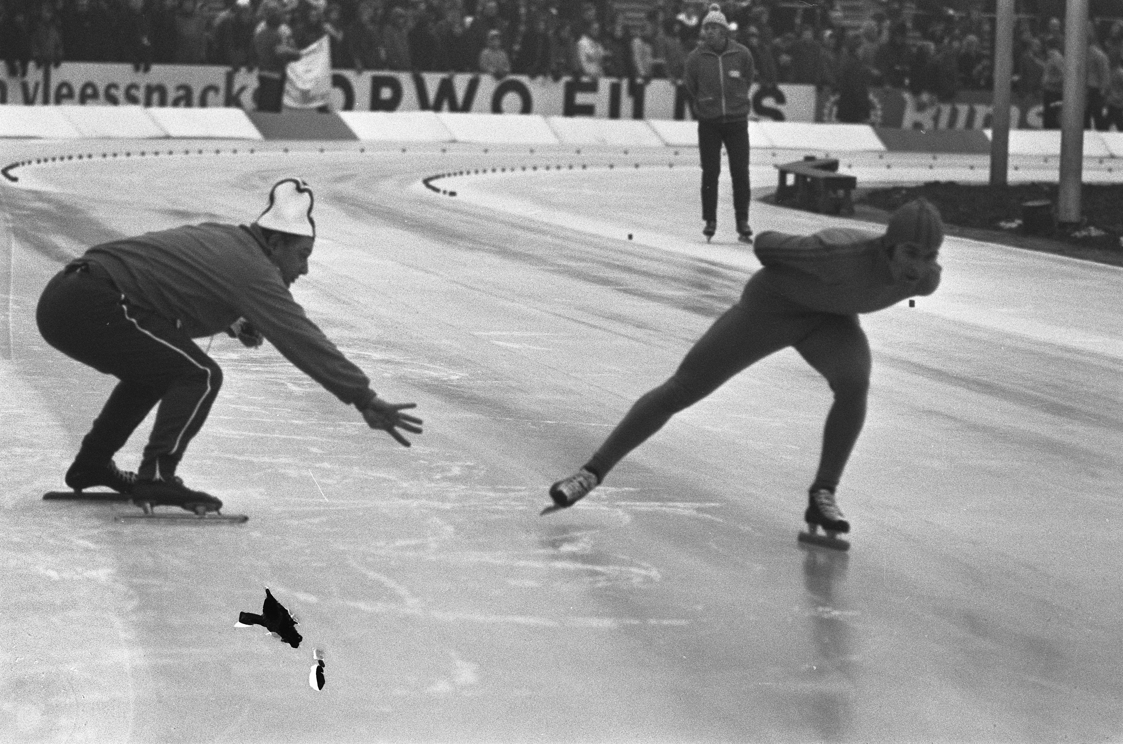 Collectie / Archief : Fotocollectie Anefo Reportage / Serie : [ onbekend ] Beschrijving : Schaatswedstrijden voor eerste ISSL World Cup voor prof op De Uithof in Den Haag , Anton Huiskes geeft Jan Bols aanwijzingen Datum : 6 januari 1973 Locatie : Den Haag, Zuid-Holland Trefwoorden : SCHAATSEN, sport Persoonsnaam : Anton Huiskes, Bols, Jan, De Uithof, Issl World Cup Fotograaf : Verhoeff, Bert / Anefo Auteursrechthebbende : Nationaal Archief Materiaalsoort : Negatief (zwart/wit) Nummer archiefinventaris : bekijk toegang 2.24.01.05 Bestanddeelnummer : 926-1419